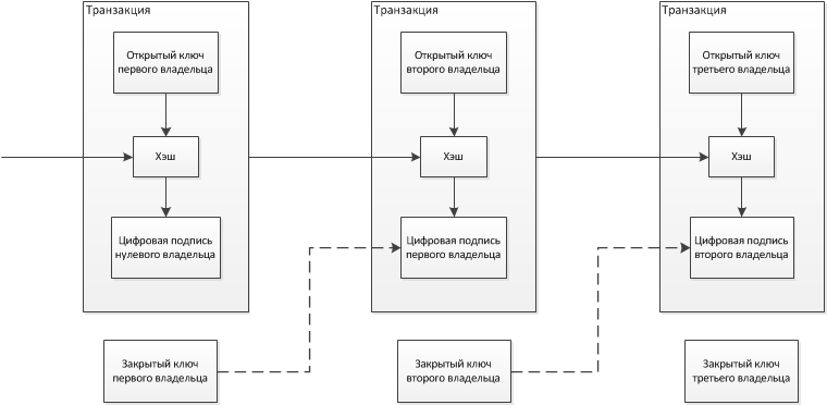 Примерное описание устройства транзакций Bitcoin